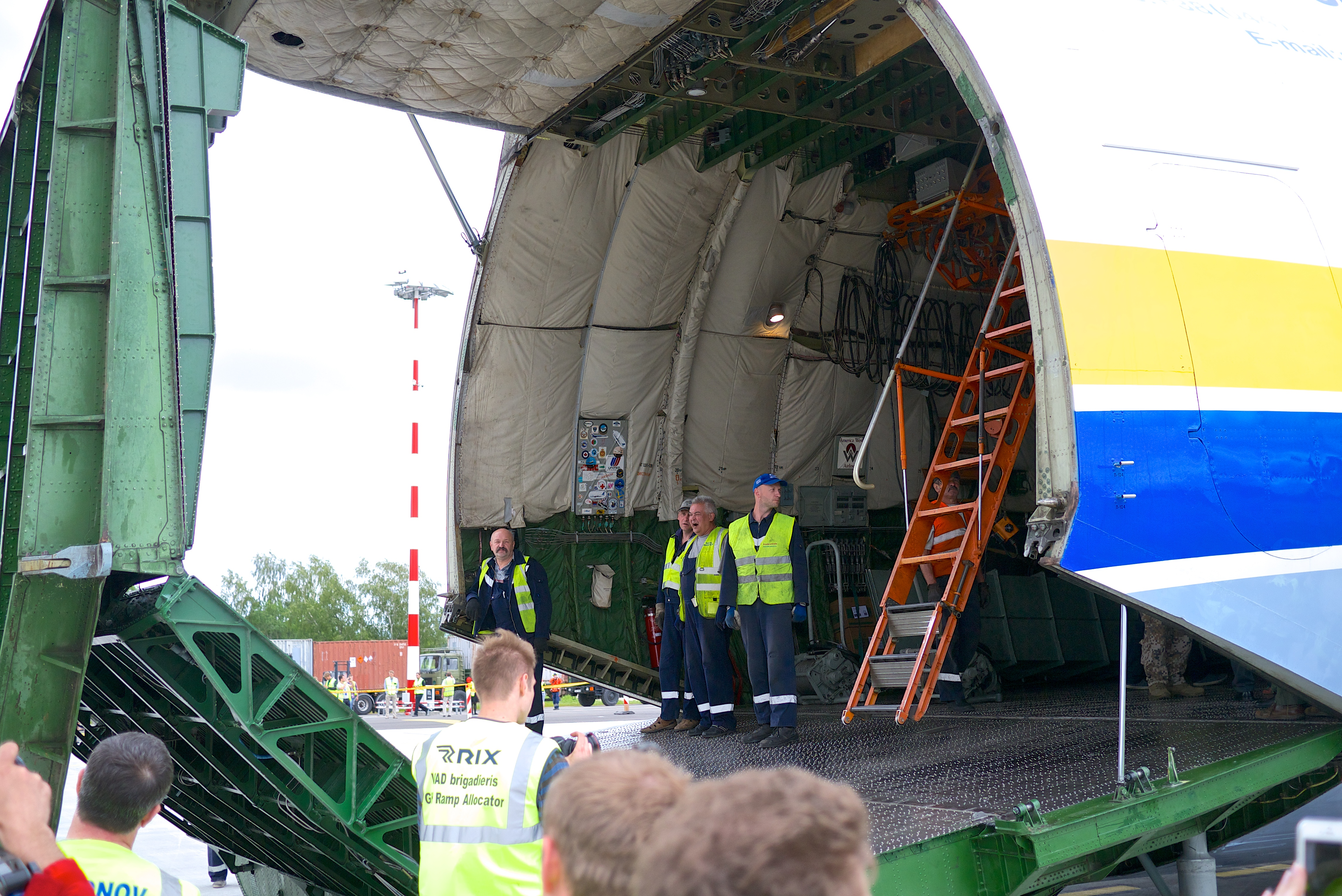 Antonov An-225 Mriya